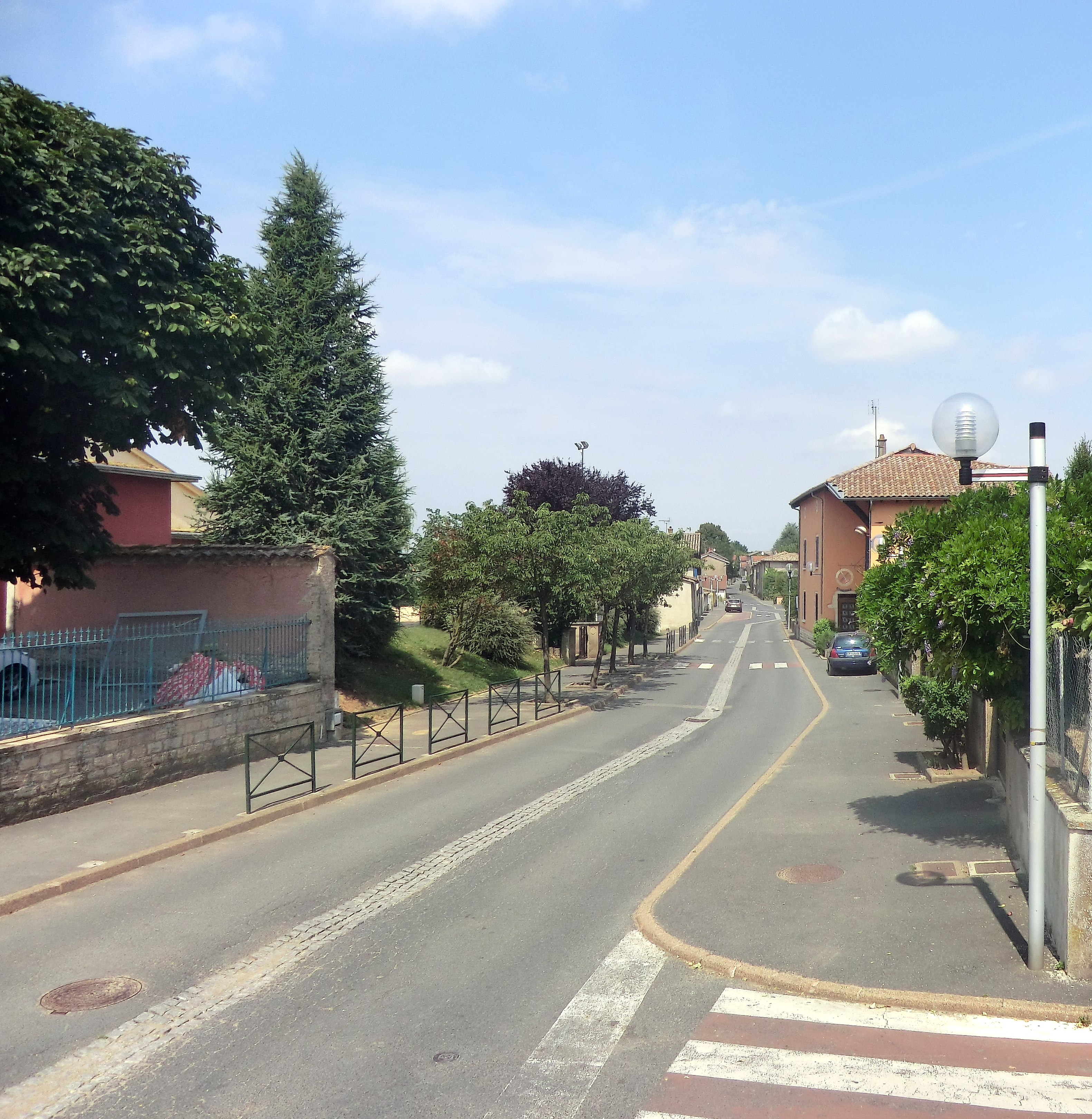 Rue de Misérieux.